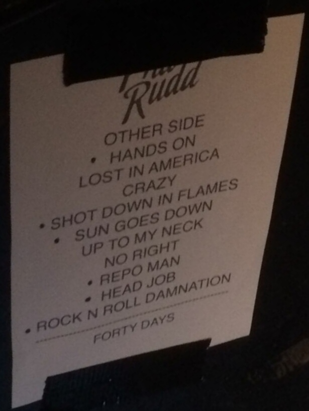 Setlist der Phil Rudd Band von der Back On The Beat Tour 2017 in der Arena Wien am 3.5.